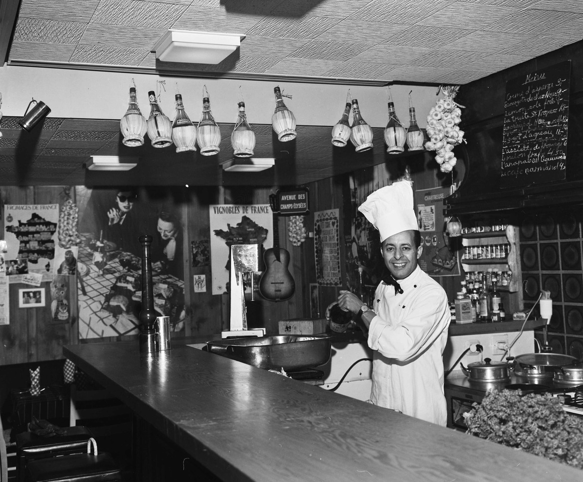 Motiv: restaurant, interiør, mann, restauratør, kokk Motivtittel: Hos Ben Joseph. Avbildede personer: Avbildet person , sikker: Joseph, Ben